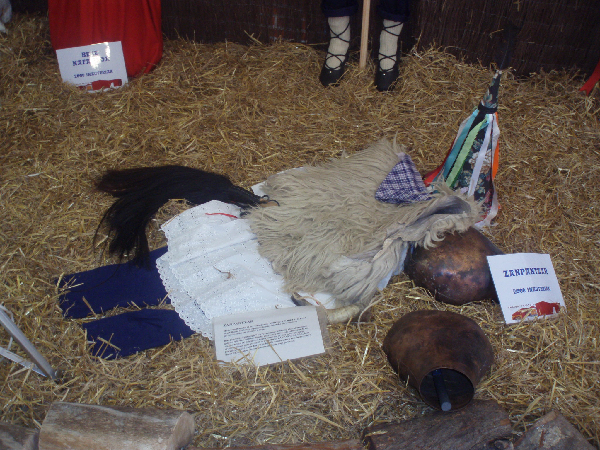 Disfraz de Zanpantzar infantil, en una exposición en la Ikastola Amaiur (Pamplona)